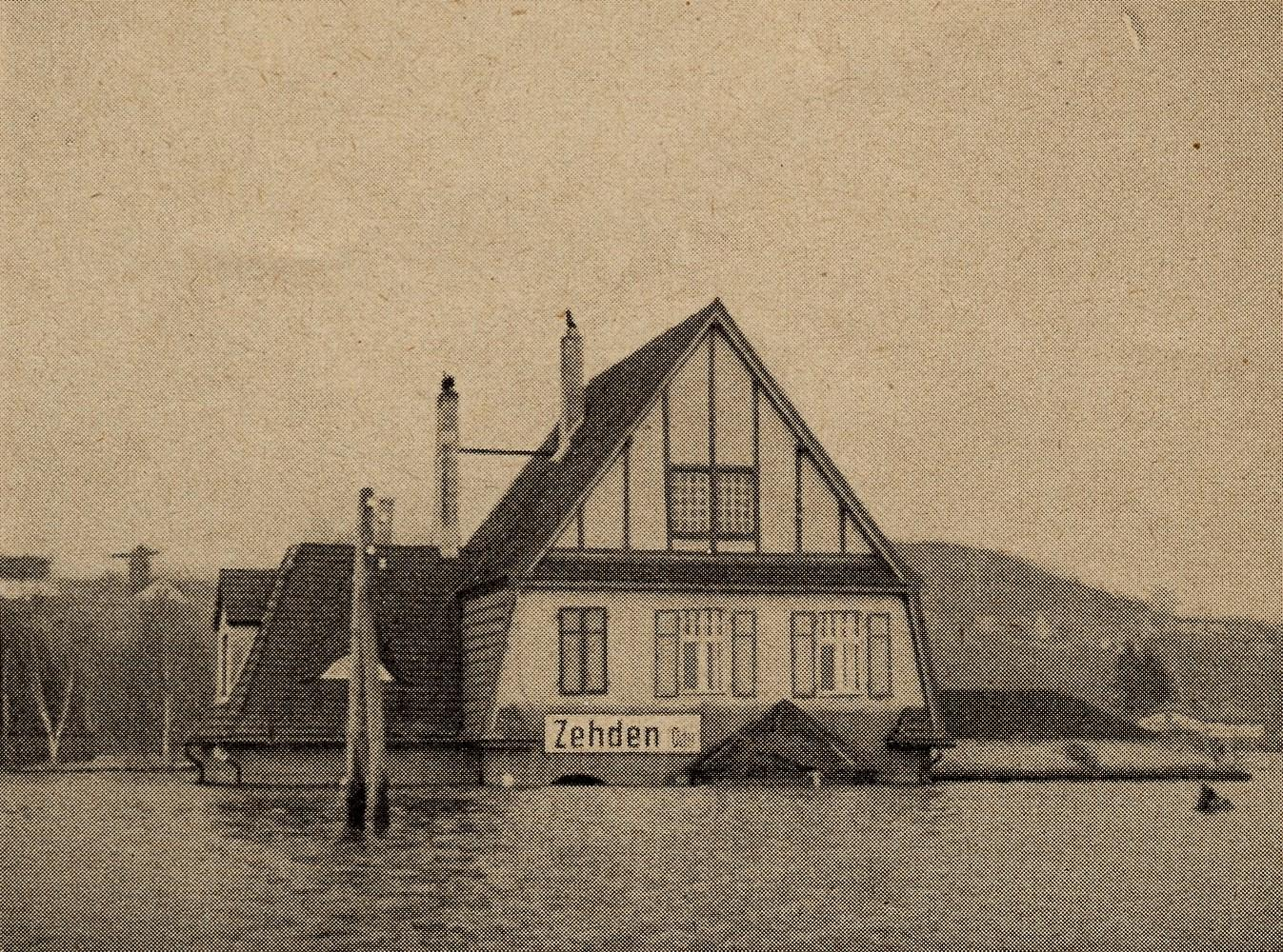 Überfluteter Kleinbahnhof Zehden nach dem Deichbruch an der Oder bei Hohensaaten im März 1940